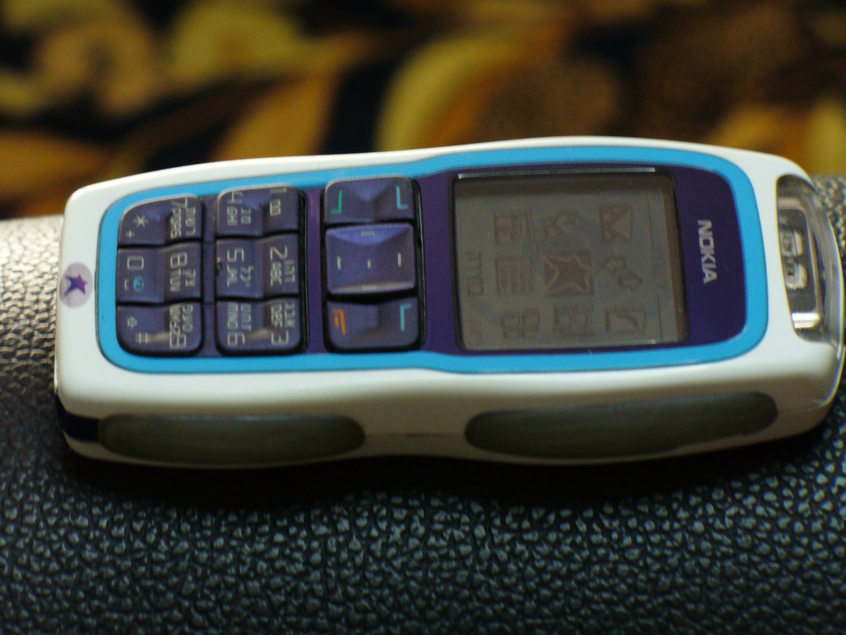 Nokia 3220, top-left view